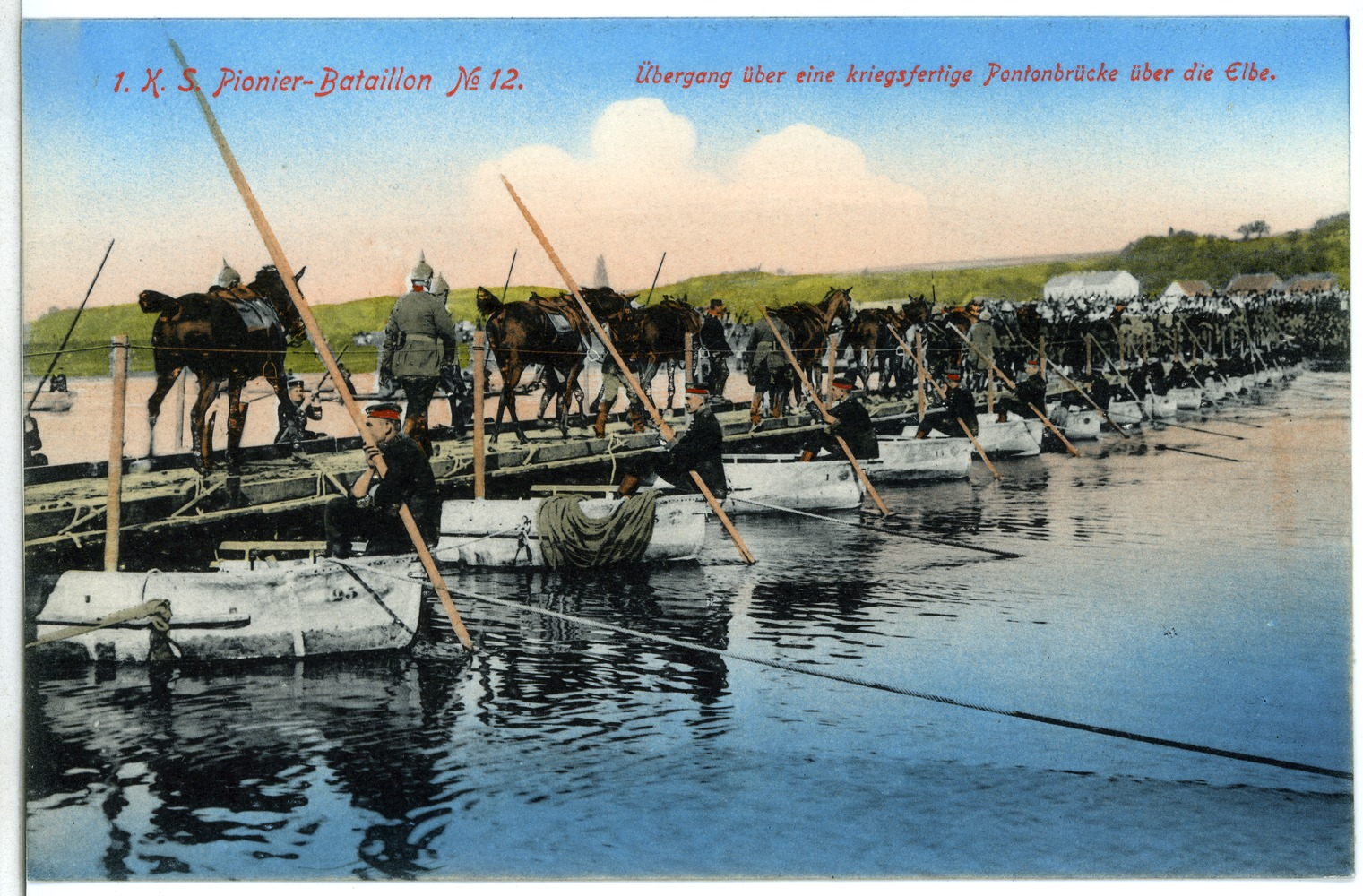 Königlich Sächsisches Pionier-Bataillon Nr. 12 This postcard is from publisher Brück & Sohn in Meißen ( postcard has a unique number 11059 and is available in a higher resolution at the publisher. This images was uploaded in a cooperation project between Wikipedians and the publisher.